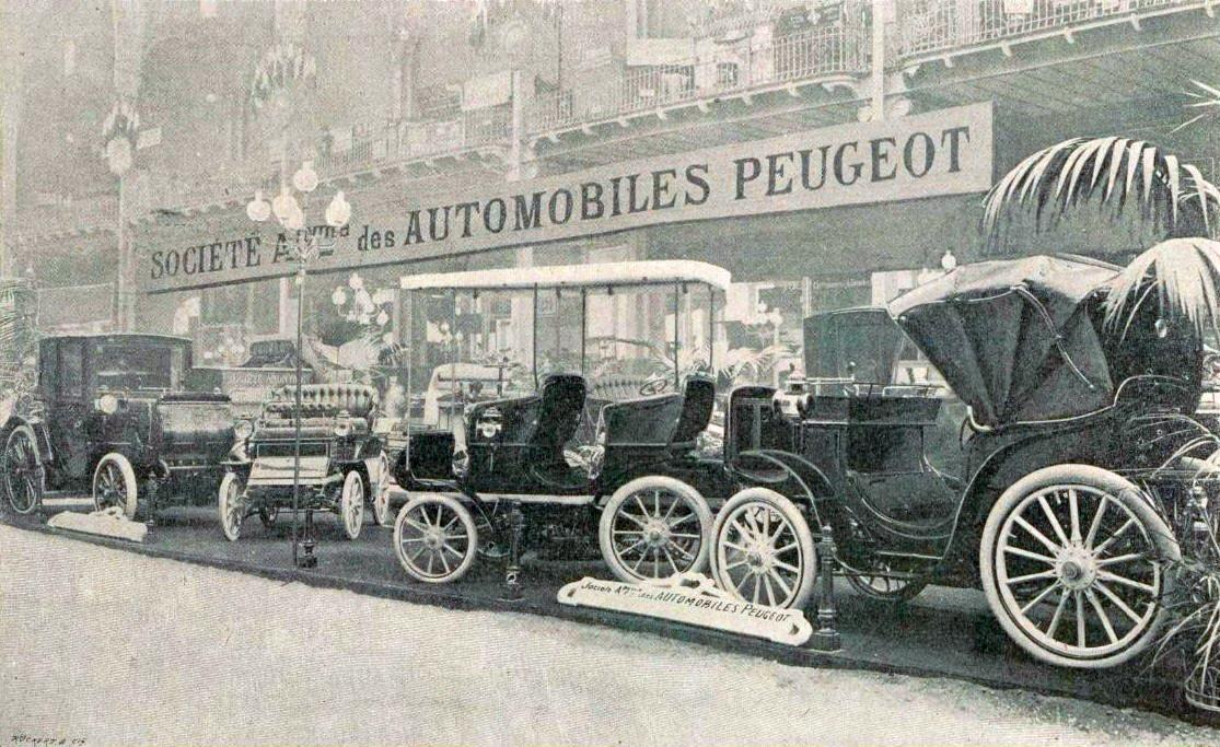 Stand Peugeot au Salon de l'Automobile de Paris, janvier 1901 (troisième édition, la première au Grand Palais)